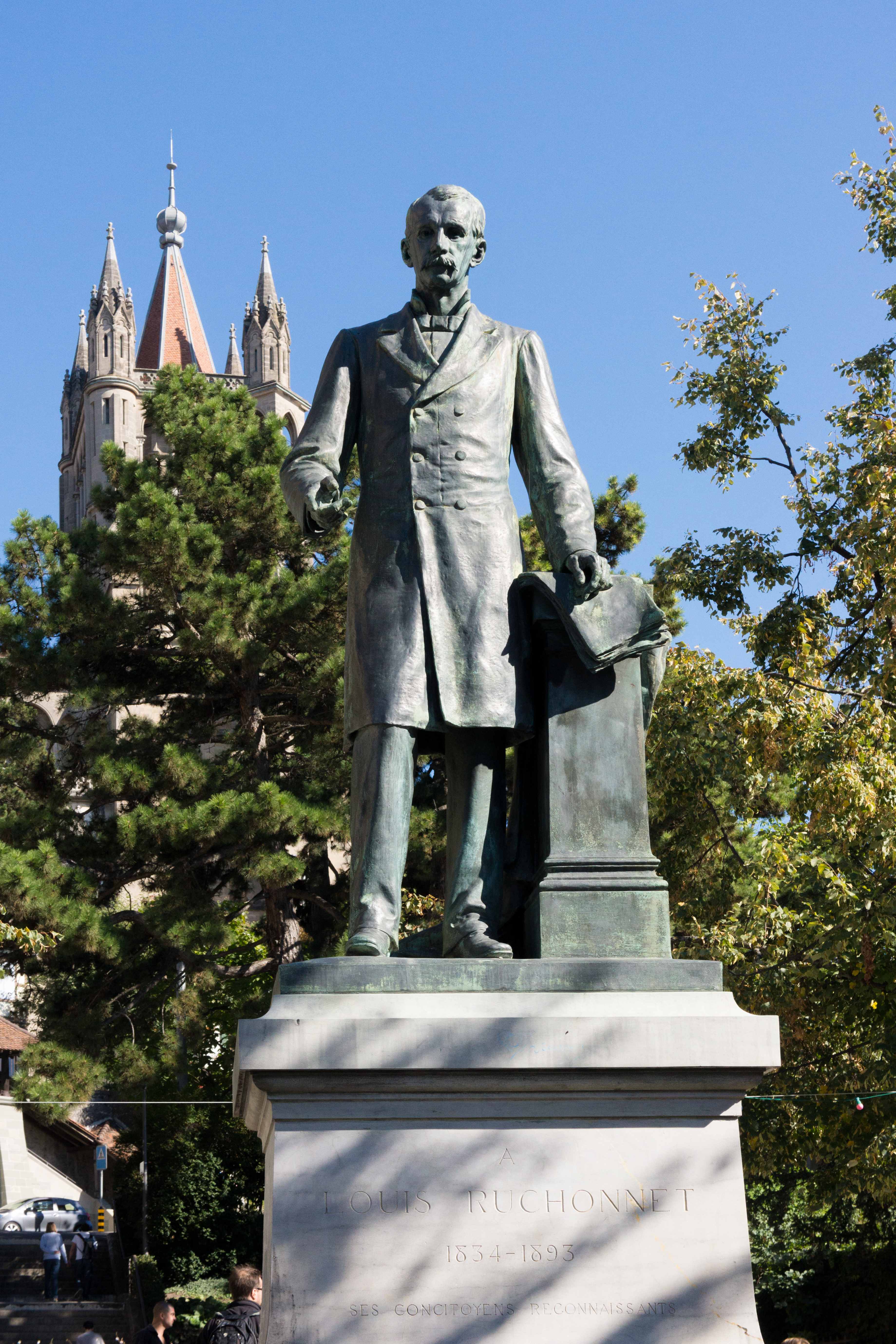 Statue of Louis Ruchonnet, place de la Madeleine, Lausanne, Switzerland